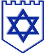 סמל הצ"ח יצרתי בעצמי Yanivreg 15:33, 4 מרץ 2006 (UTC)